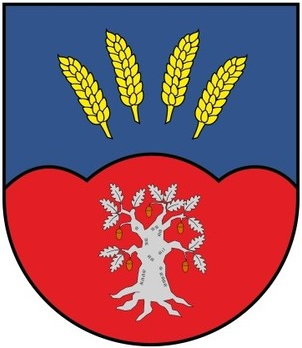 Die Ähren symbolisieren die vier Ortsteile Aspe, Essel, Kutenholz und Mulsum, aus denen am 1. Juli 1972 die neue Gemeinde Kutenholz hervorgegangen ist. Der Dreiberg steht für die Stader Geest und die Eiche entstammt dem Wappen der ehemaligen Gemeinde Kutenholz. Leider wurde hier gegen die heraldische Farbregel verstoßen, welche lautet das Farben nicht an Farben sondern nur an Metalle (Gold und Silber) grenzen dürfen.